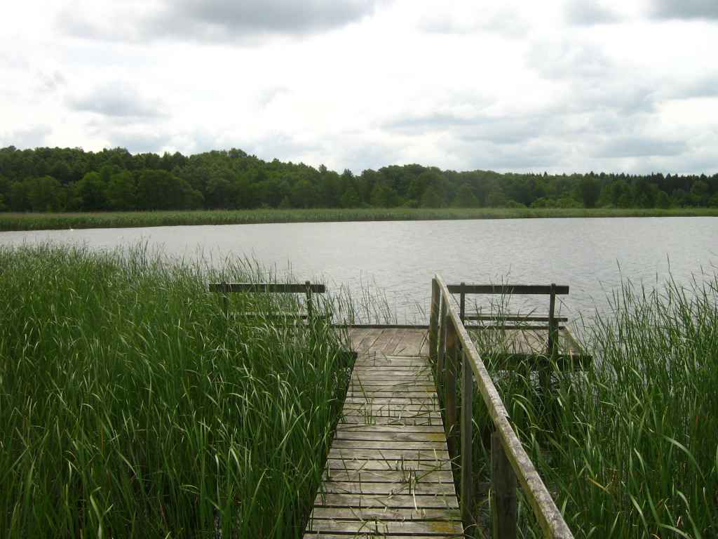 Der Latzigsee bei Rothenklempenow im Landkreis Uecker-Randow (Pommern). 53°32′27.04″N 14°11′50.87″E / 53.5408444°N 14.1974639°E